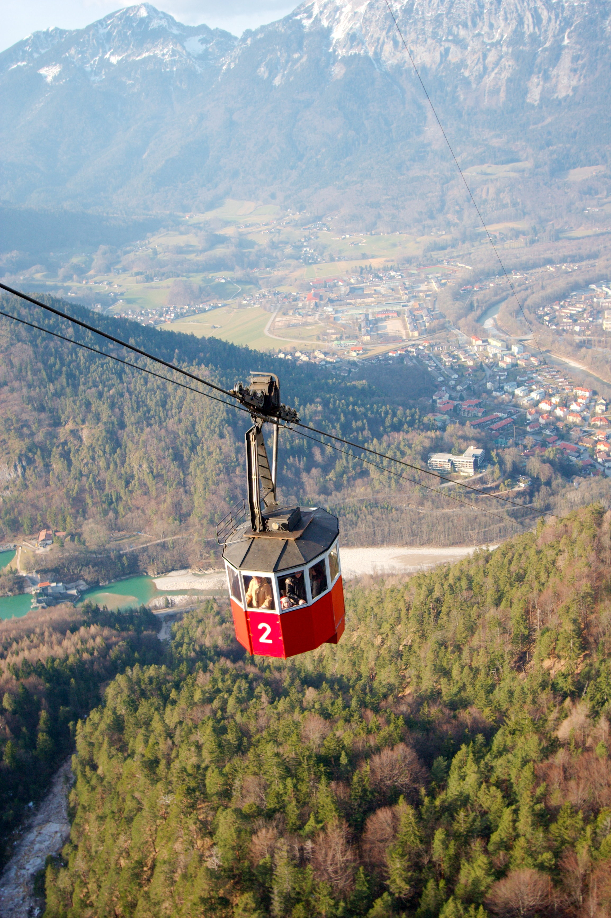 Kabine.